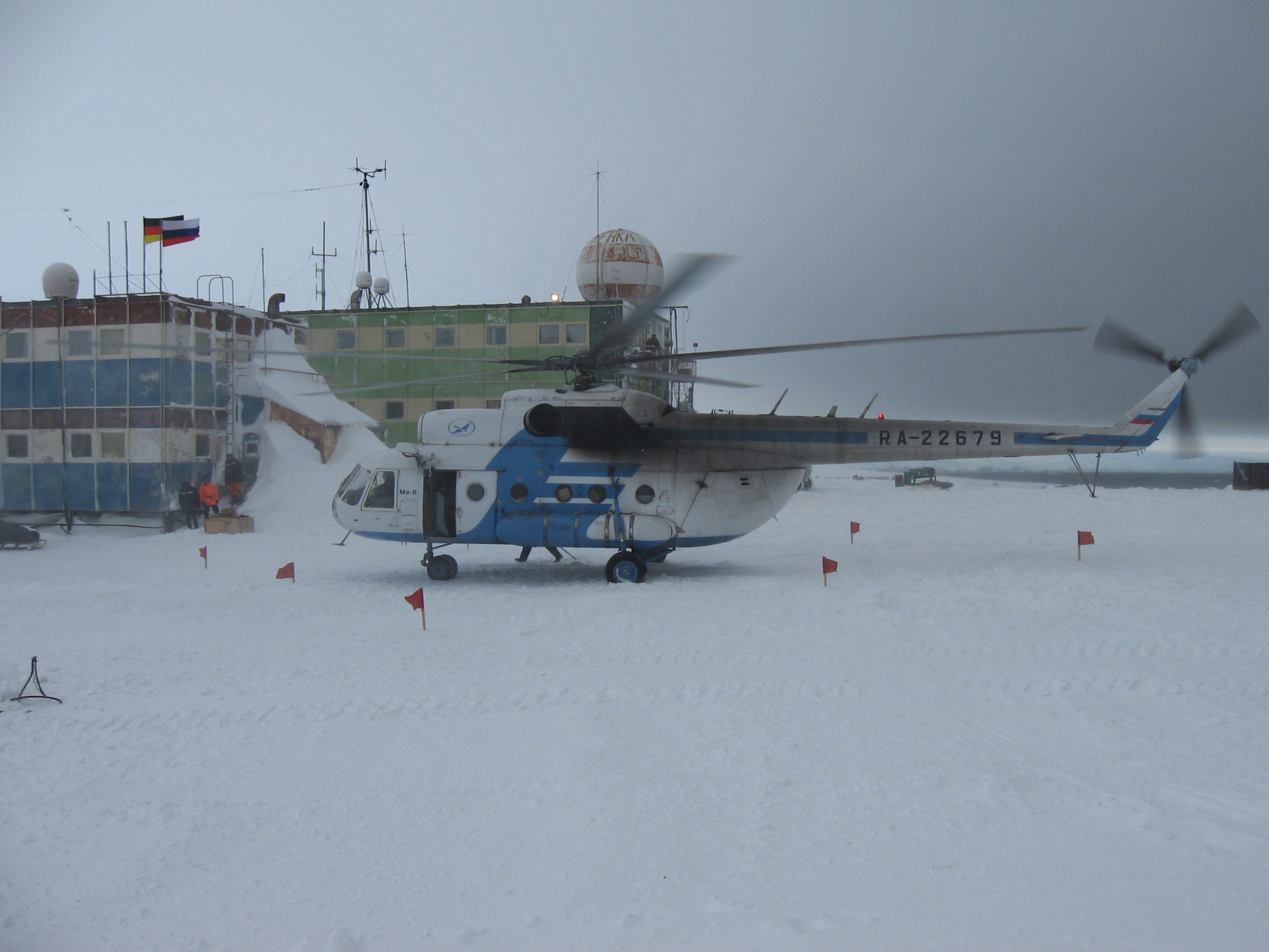 "на центральной плащади станции..."